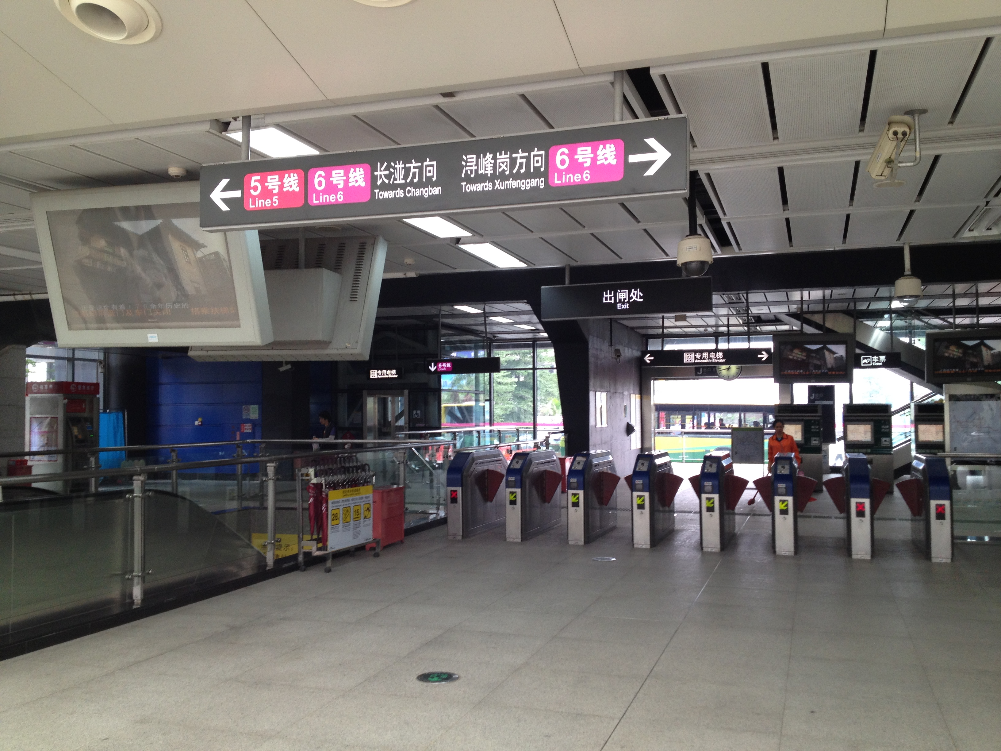 广州地铁坦尾站地面站厅